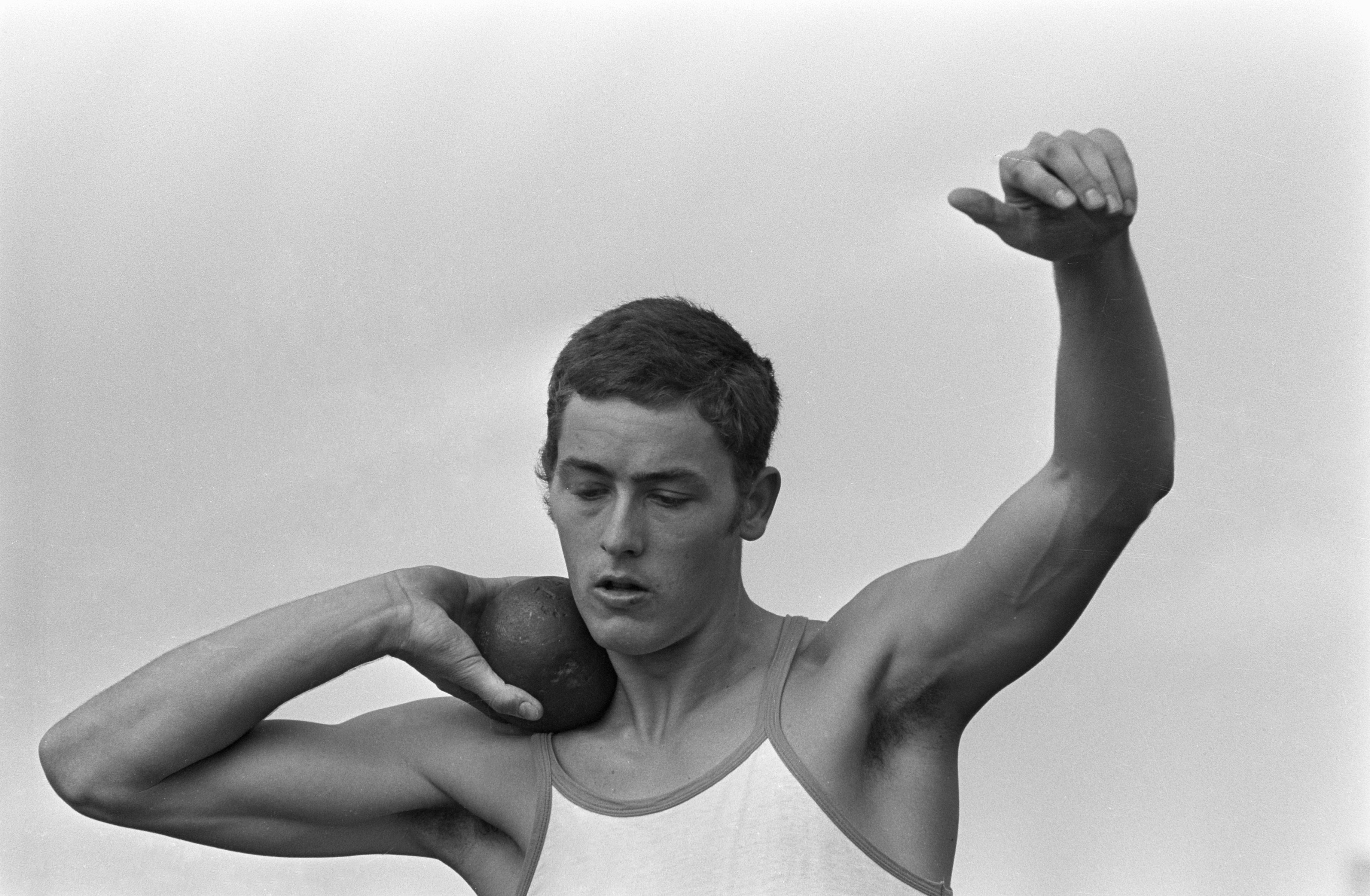 Collectie / Archief : Fotocollectie Anefo Reportage / Serie : Nederlandse kampioenschappen vijf- en tienkamp te Vlaardingen 1968 Beschrijving : Ed de Noorlander concentreert zich tijdens het kogelstoten Datum : 31 augustus 1968 Locatie : Vlaardingen, Zuid-Holland Trefwoorden : atletiek, kogelstoten, portretten, sport Persoonsnaam : Ed de Noorlander Fotograaf : Fotograaf Onbekend / Anefo Auteursrechthebbende : Nationaal Archief Materiaalsoort : Negatief (zwart/wit) Nummer archiefinventaris : bekijk toegang 2.24.01.05 Bestanddeelnummer : 921-6406